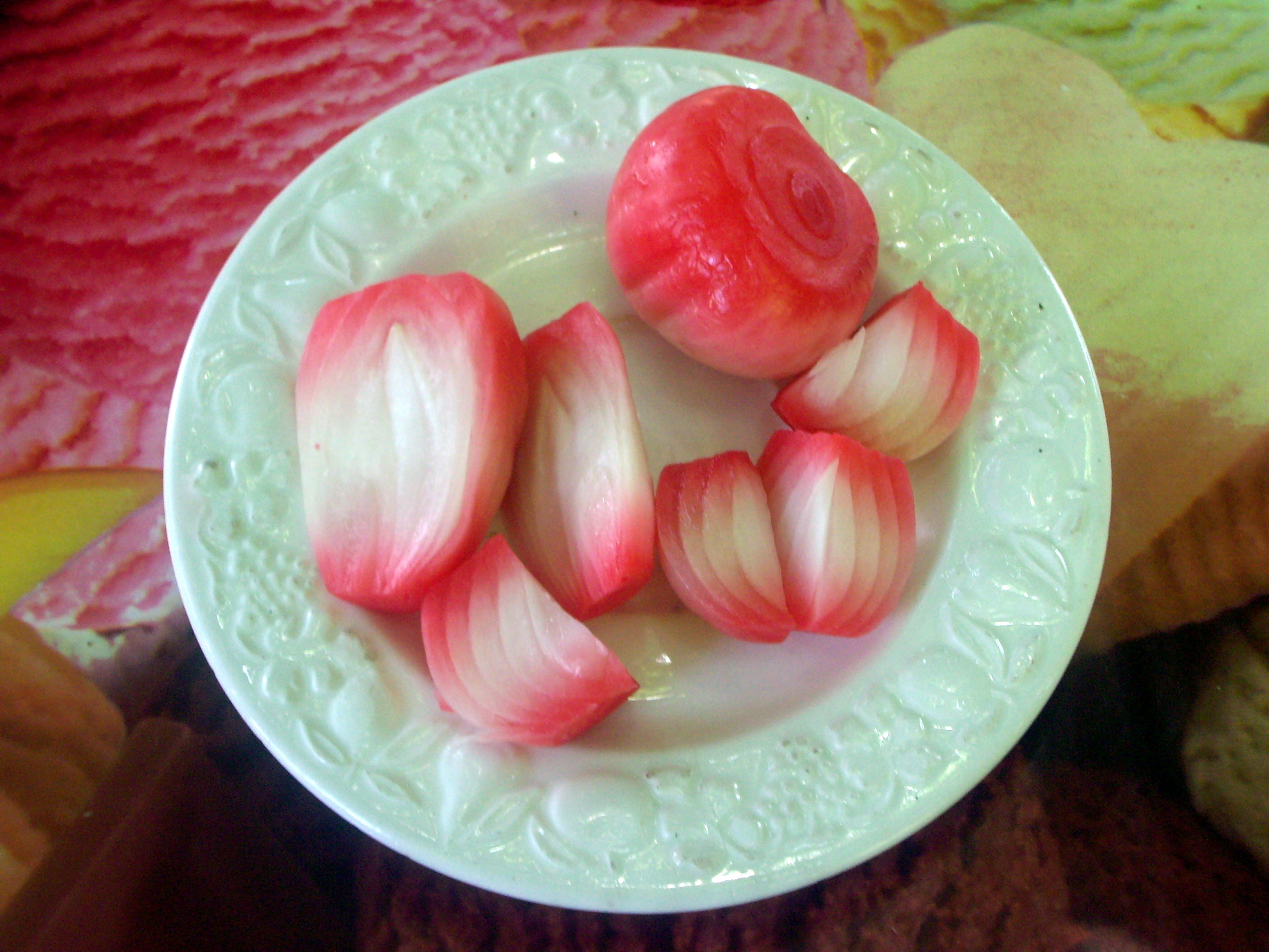 Ceba en salmorra. (Cebetes en aigua-sal).